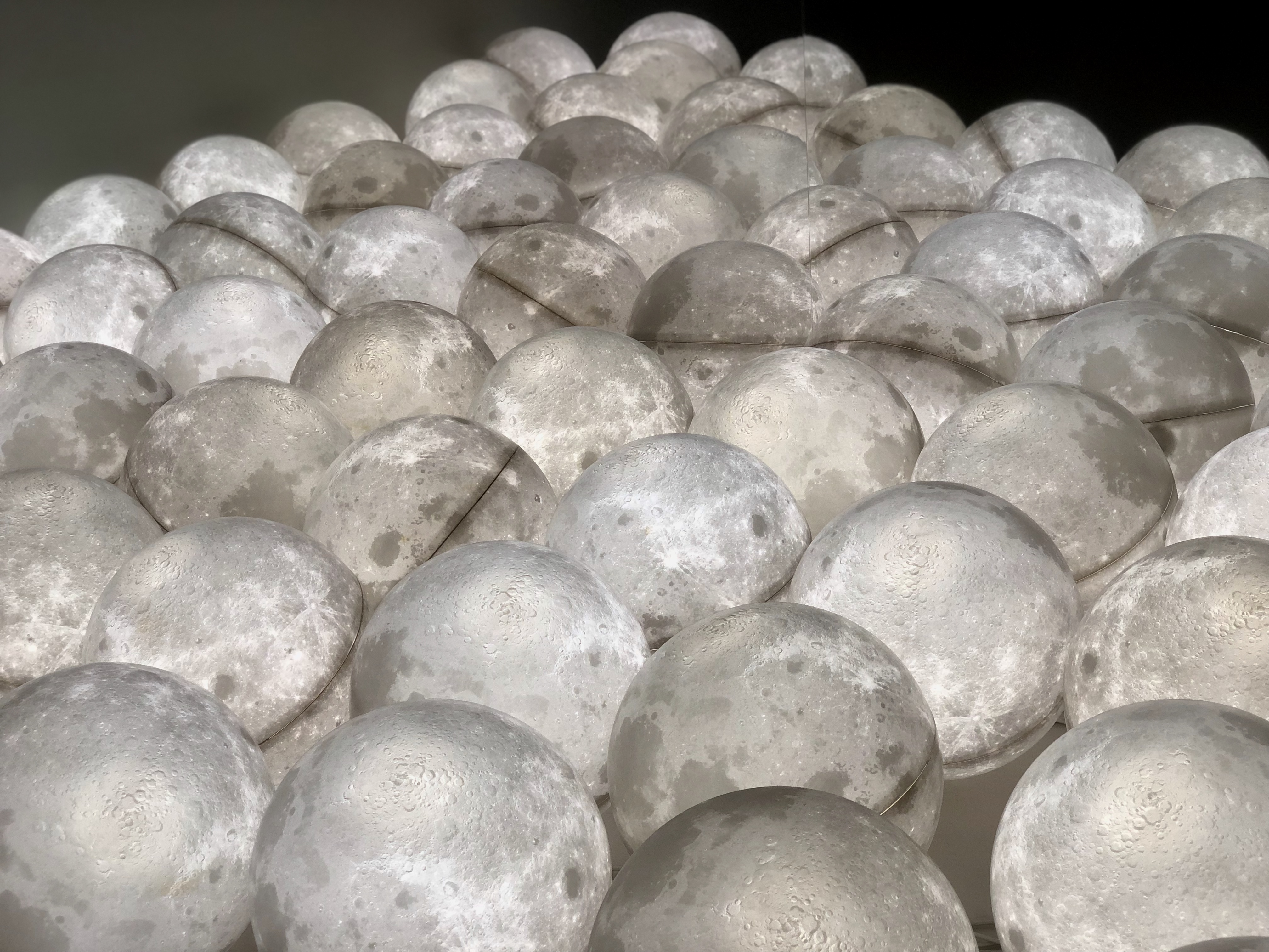 Exposition La Lune - du voyage réel aux voyages imaginaires au Grand Palais à Paris - #ExpoLune